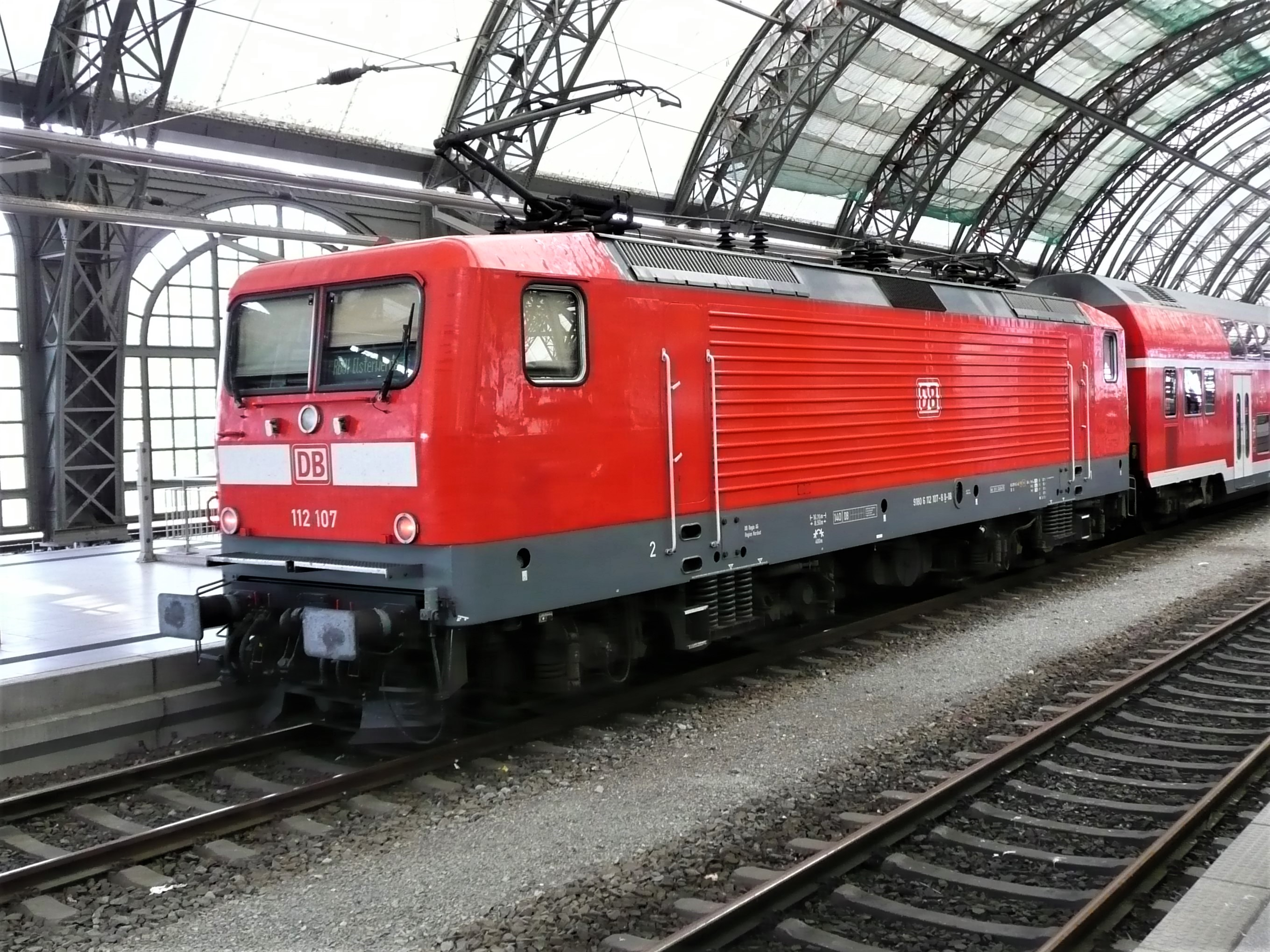 112 107 der DBAG in Dresden Hauptbahnhof